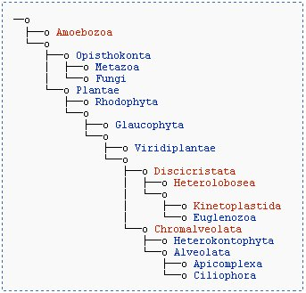 Eukaryota_Arbre__selon_Nozaki_et_al